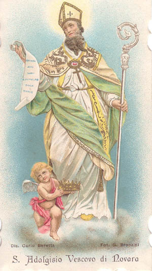 Il vescovo Adalgisio da Novara, stampa devozionale d'epoca